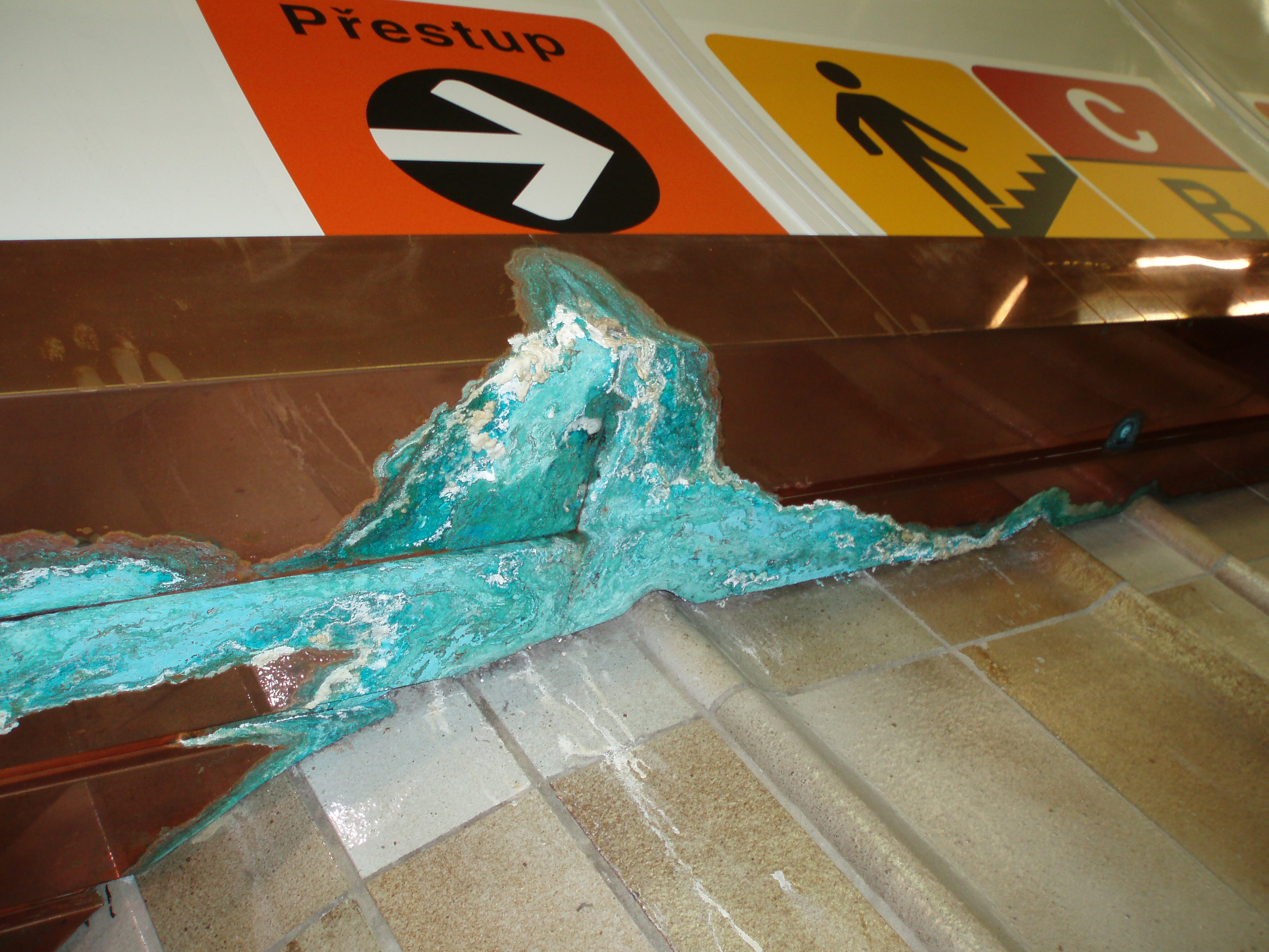 Verdigris in Prague Underground